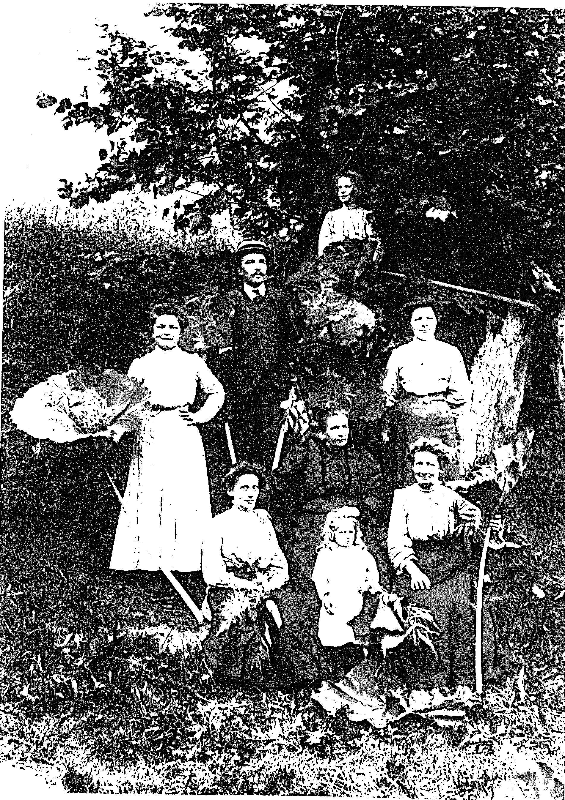 Roberto Donetta famiglia Rachele Bozzini undatiert